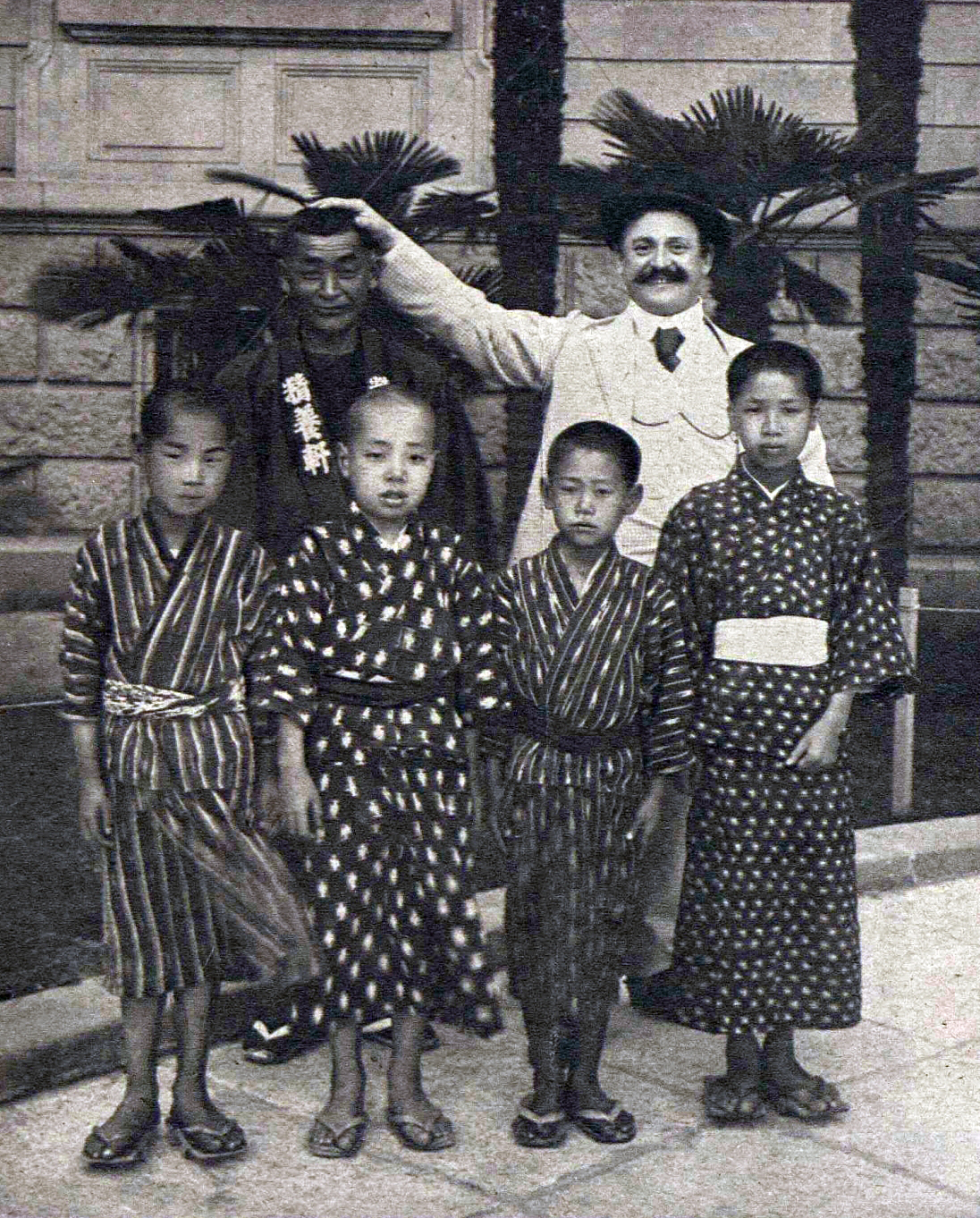 Анатолий Леонидович Дуров в Токио с приглашённой им японской труппой